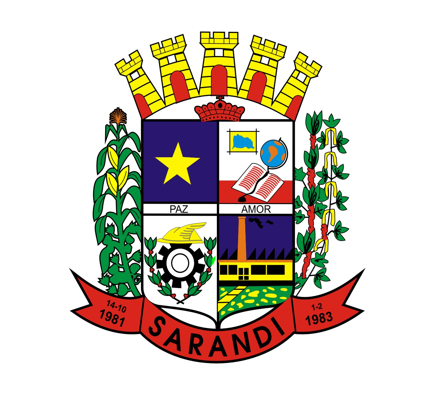 Brasão Oficial do Município de Sarandi - PR